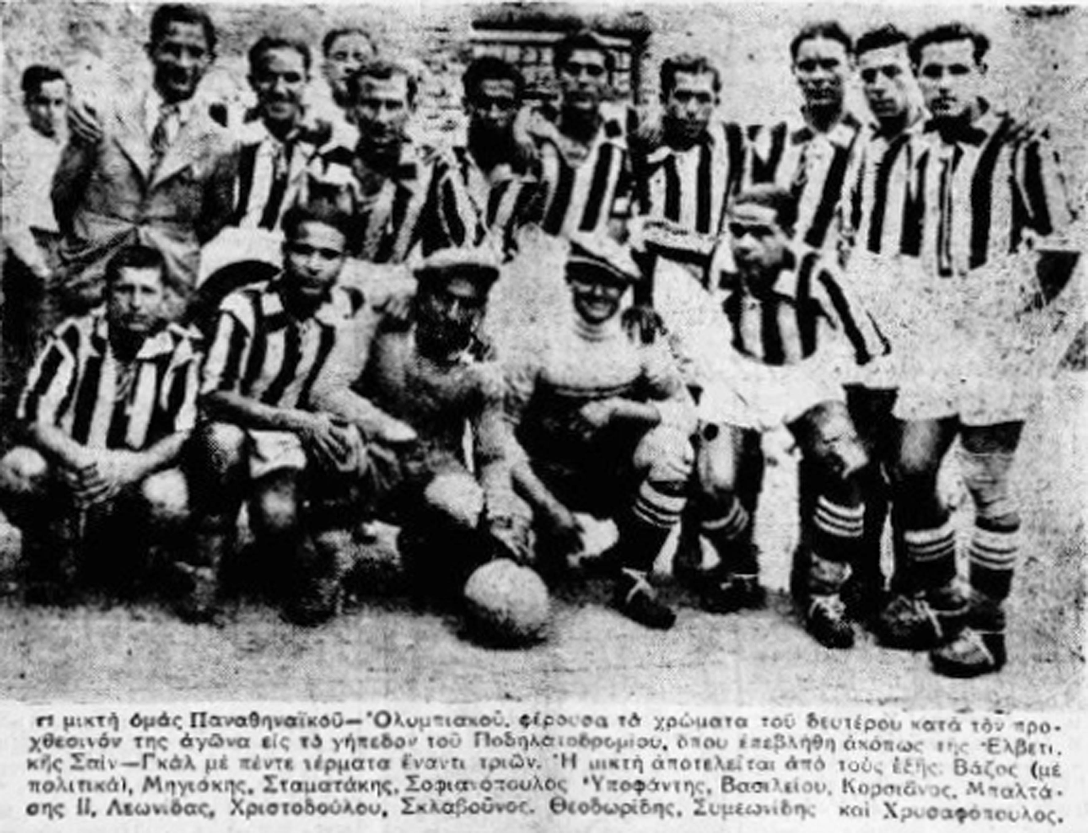 Μικτή Ολυμπιακού Παναθηναικού στις 21 Μαΐου 1934, όπως παρατάχθηκε εναντίον της ελβετικής Σεν Γκάλεν (με φανέλες Ολυμπιακού) στο ποδηλατοδρόμιο του Καραισκάκη. Στην ιστορική φωτογραφία της εφημερίδας «Αθλητικά Χρονικά» ποζάρουν οκτώ παίκτες του Παναθηναϊκού και έξι του Ολυμπιακού, ο ένας εξ αυτών (Γιάννης Βάζος) με πολιτική ένδυση. Διακρίνονται οι: Βαζος,Μηγιάκης, Σταματόπουλος ,Αθανάσοπουλος,Υποφάντης , Βασιλείου, Κορσιάνος, Μπαλτάσης, Λεωνίδας,Χριστοδούλου,Σκλαβούνος, Θεοδωρίδης, Συμεωνίδης και Χρυσαφόπουλος.